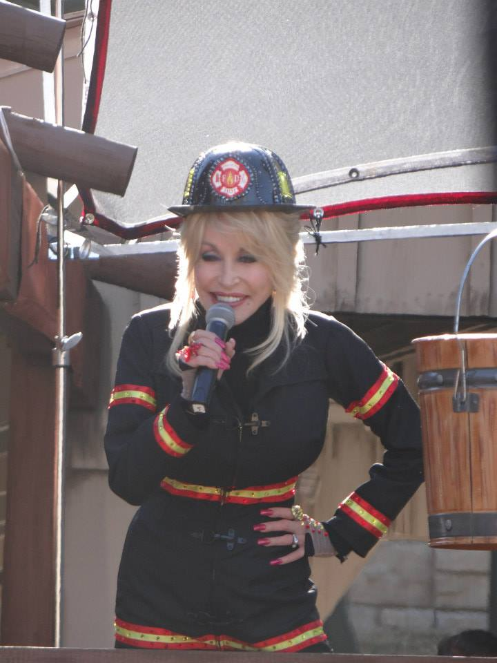 Dolly Parton, vestida con ropa de bombero, en Dollywood, presentando nuevas atracciones. Tiene un micrófono en sus manos.